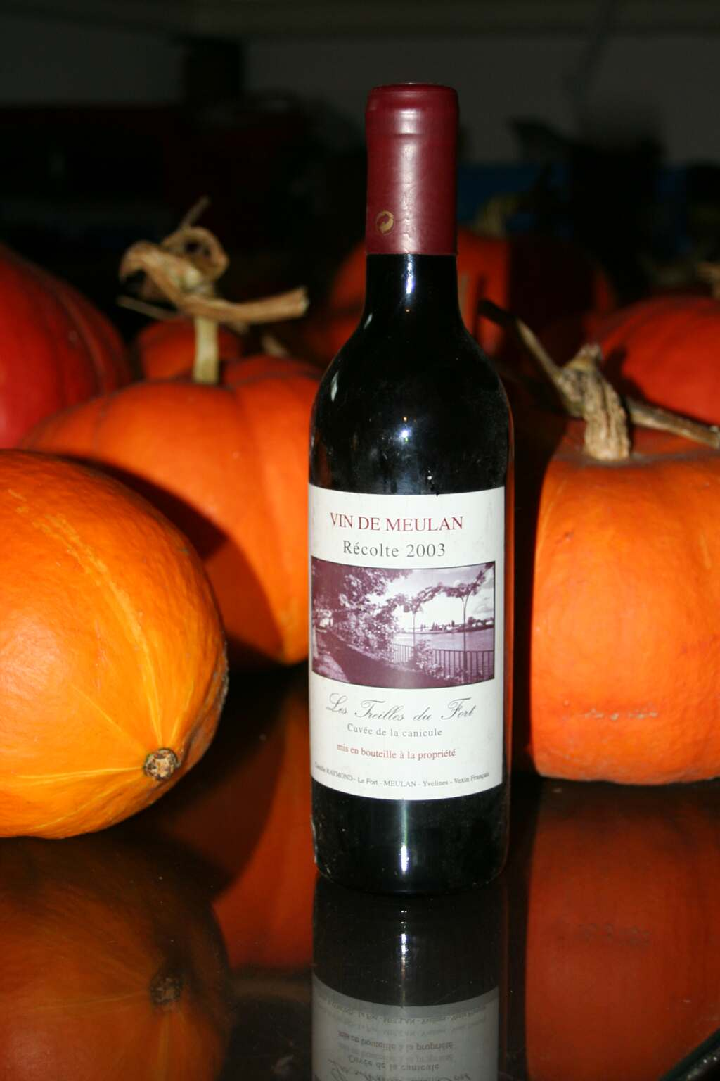 Bouteille de vin de Meulan - Yvelines (France)